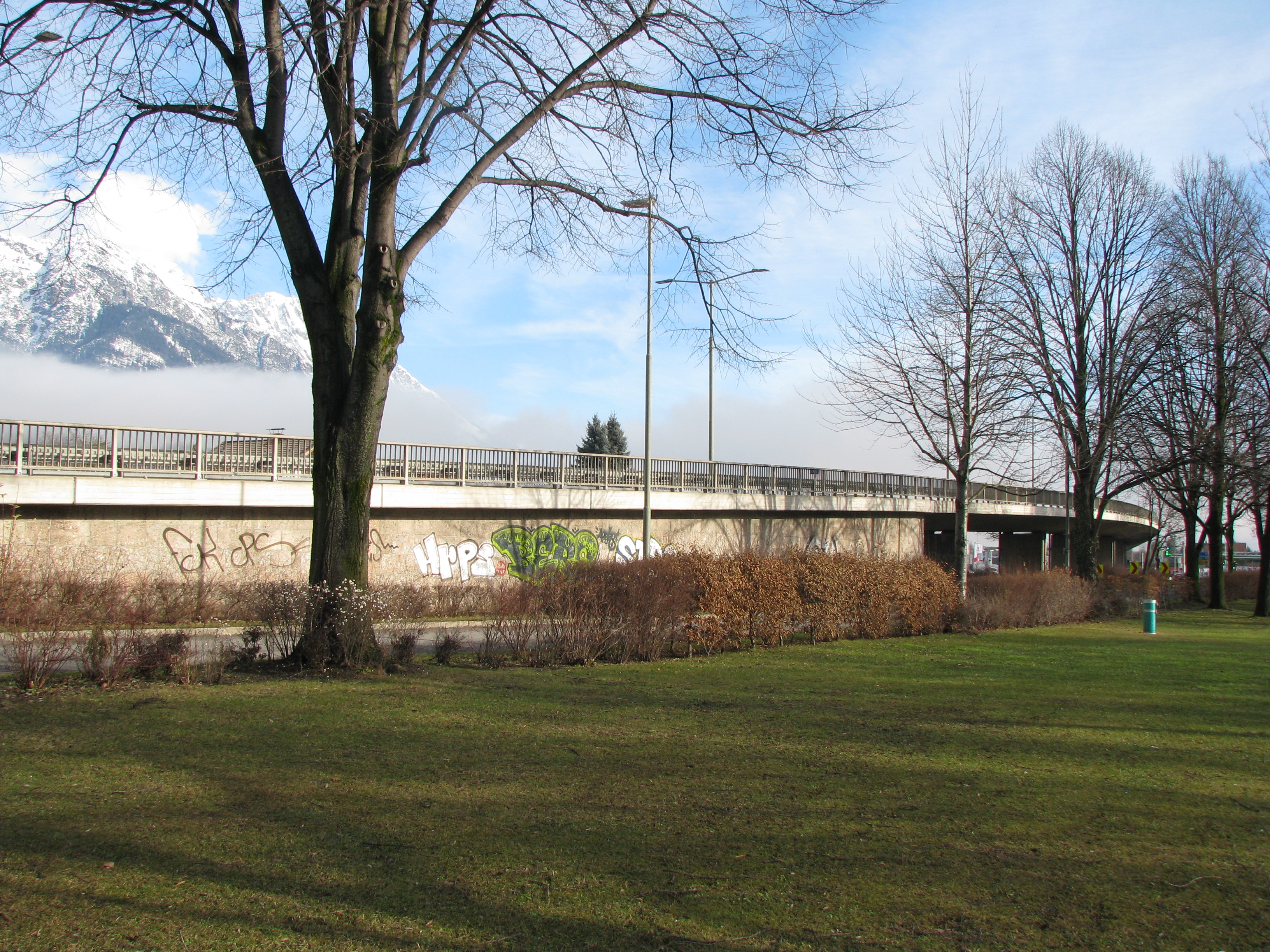 Innsbruck, Hochbrücke Haller Straße, Überführung über die Kreuzung Haller Straße/Grenobler Brücke/Schützenstraße/Schusterbergweg